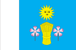 Прапор Новоушицького району